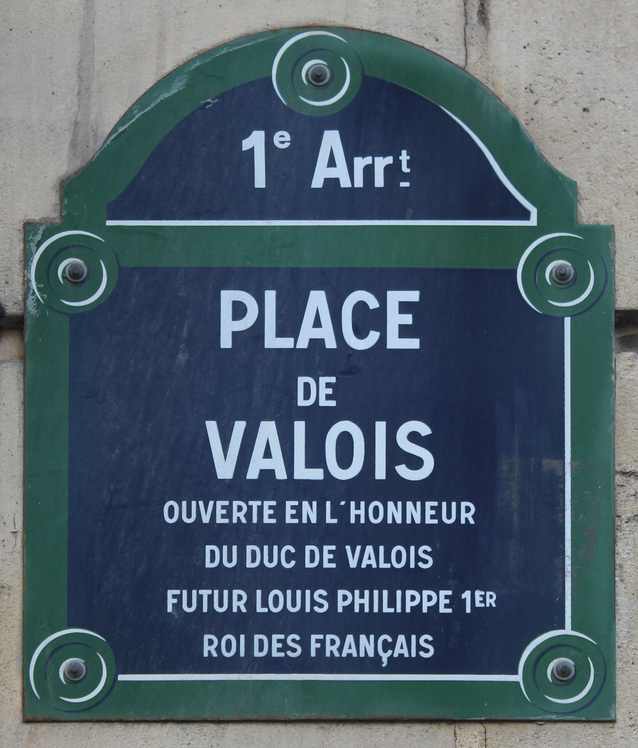 Plaque de la place de Valois, Paris.